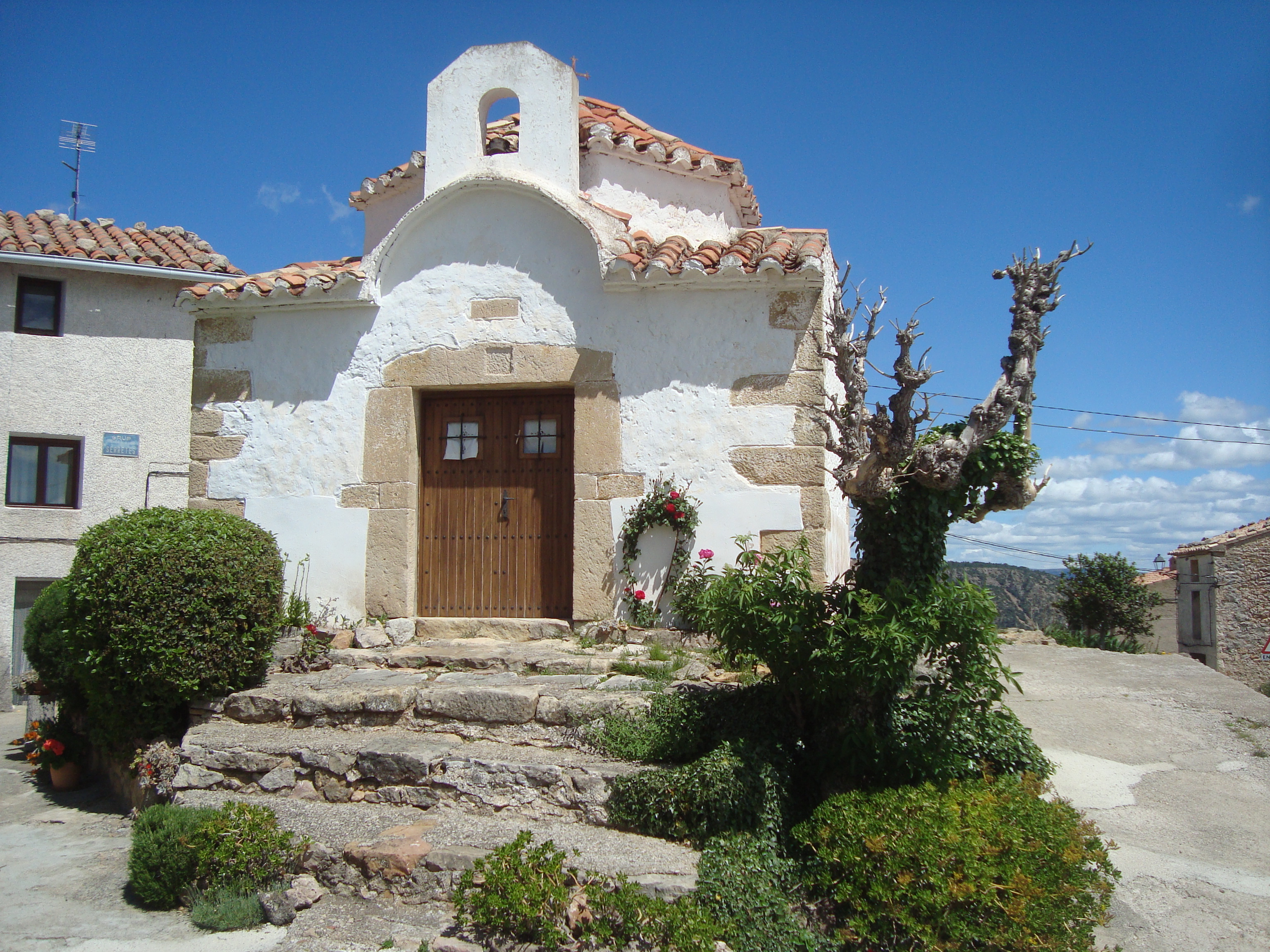 Ermita del Calvari (Benafigos) 04.025-003.